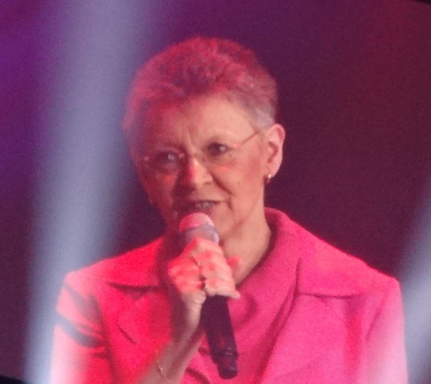 Françoise Barré-Sinoussi lors de la réception du doctorat honoris causa à l'École polytechnique fédérale de Lausanne le samedi 4 octobre 2014.